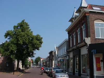 Nedersaksies: stroate in Aalsmeer